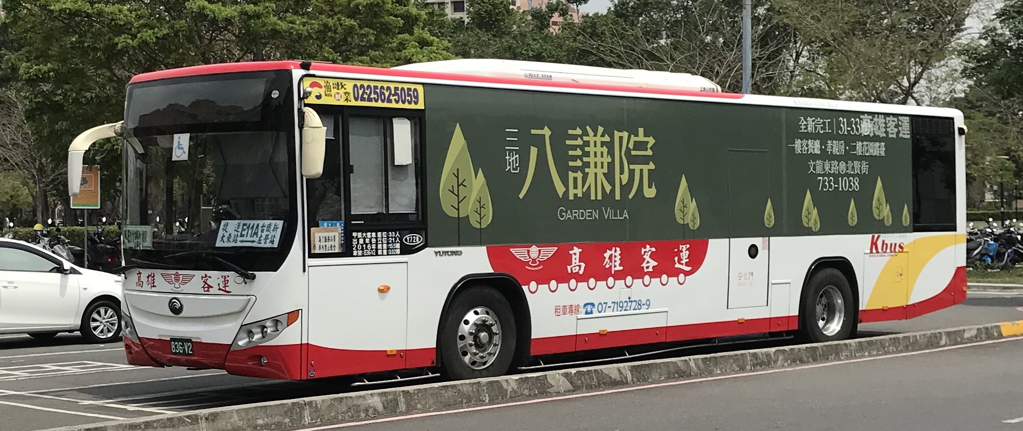 高雄客運台灣宇通ZK6118HGA大客車836-V2。